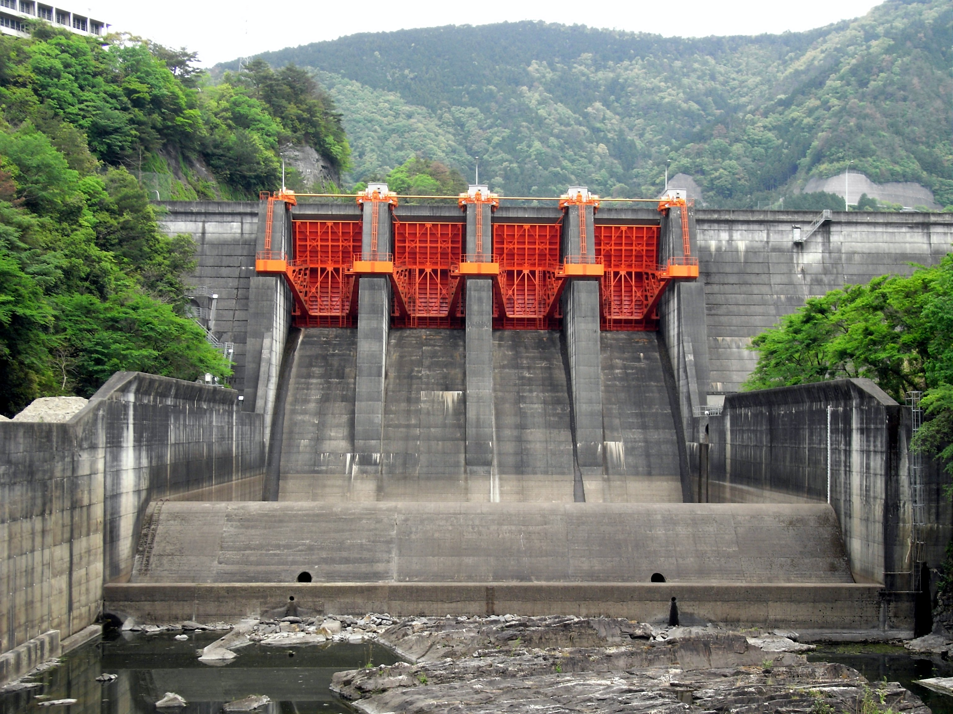 Dam